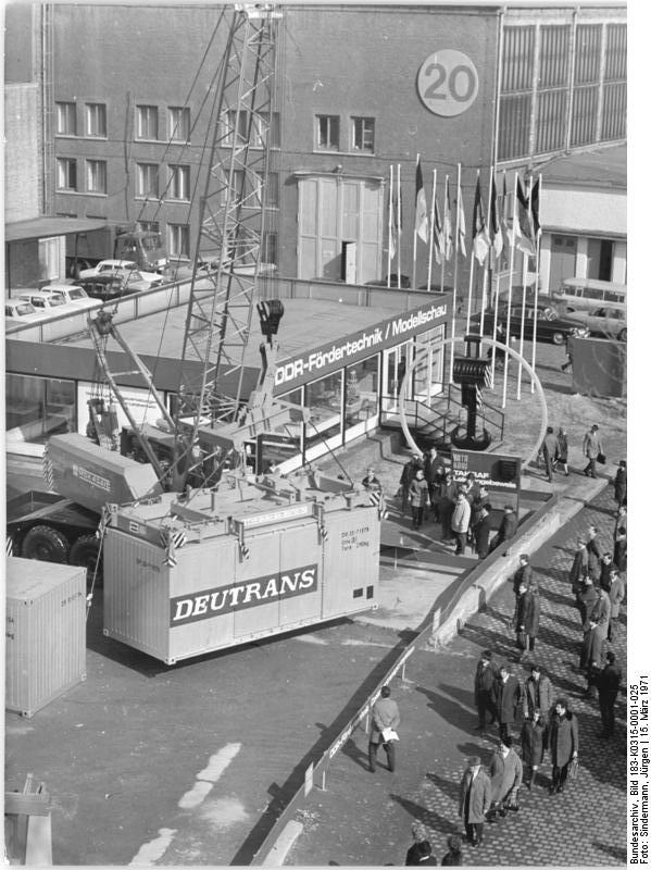 Leipzig, Frühjahrsmesse, Freigelände, Mobildrehkran Zentralbild Sindermann 15.3.71 Leipziger Frühjahrsmesse 1971. Auf dem Freigelände der VVB TAKRAF zeigen die VEB Kirow-Werke Leipzig einen neuentwickelten Mobildrehkran mit einem 150 PS-Dieselmotor. Die von der Firma Gresse & Co. Wittenberg produzierten Verstellspreader ermöglichen das Versetzen von 10- und 20-Fuß-Containern. Mit dem modernen Mobilkran können 2 Container übereinandergestapelt werden, wobei eine Hubhöhe von 2, 9 m bei einer Tragkraft von 20 Tonnen erreicht wird.